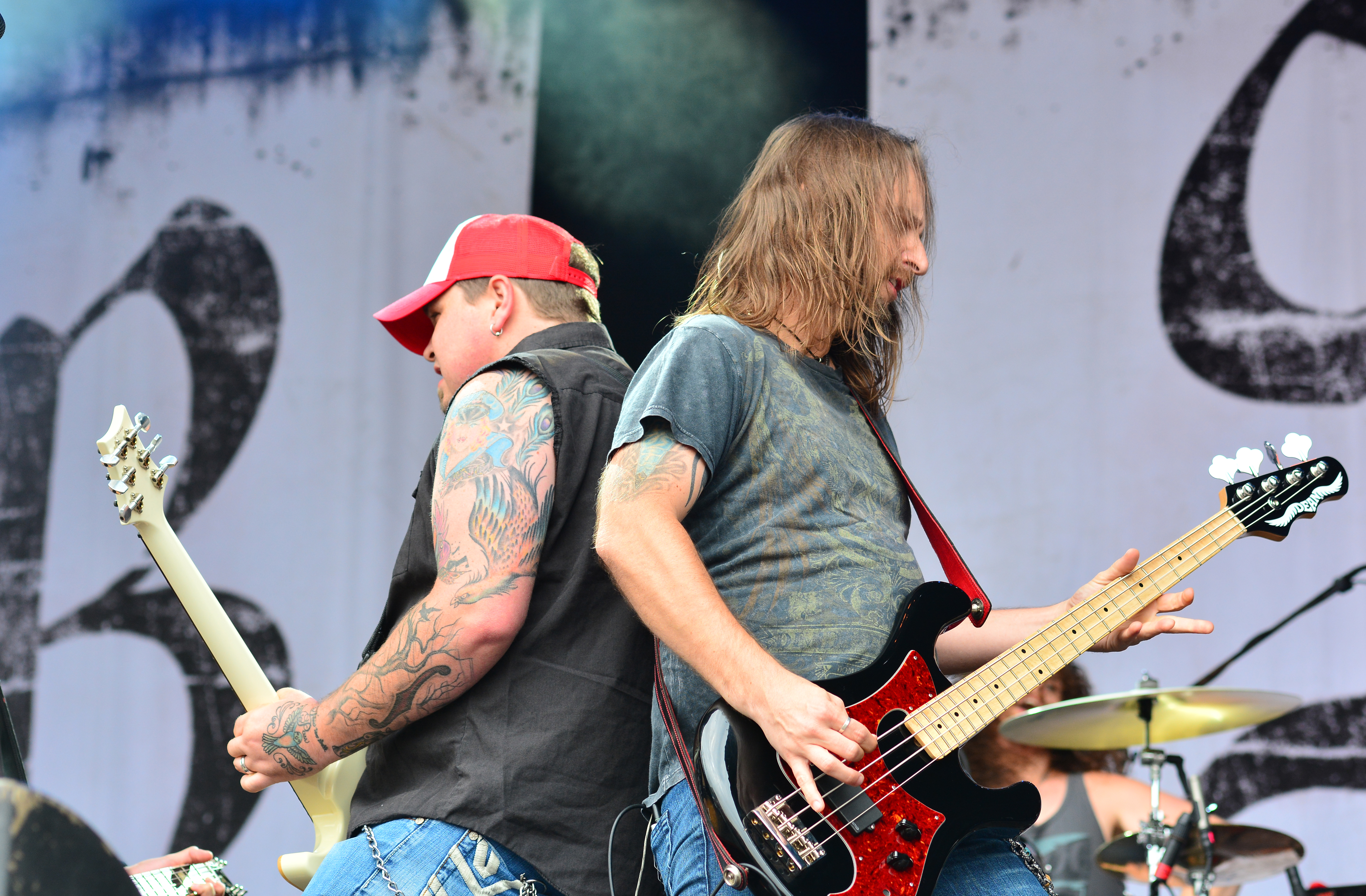 Black Stone Cherry beim Elbriot 2015